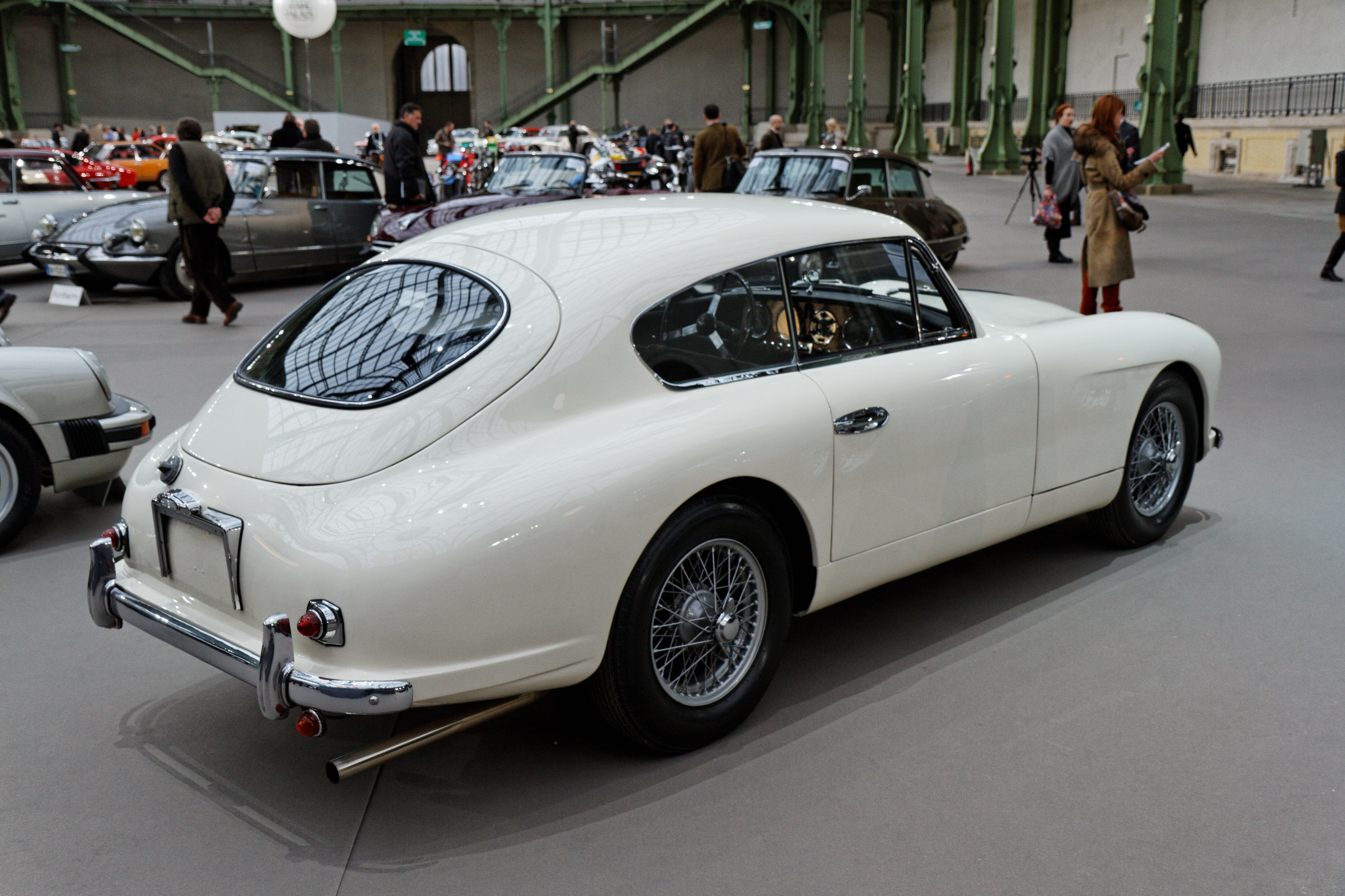 Une Aston Martin DB2 4 Mk1 3.0 Litre Sports Saloon au Grand Palais lors de la vente Bonhams en février 2014.